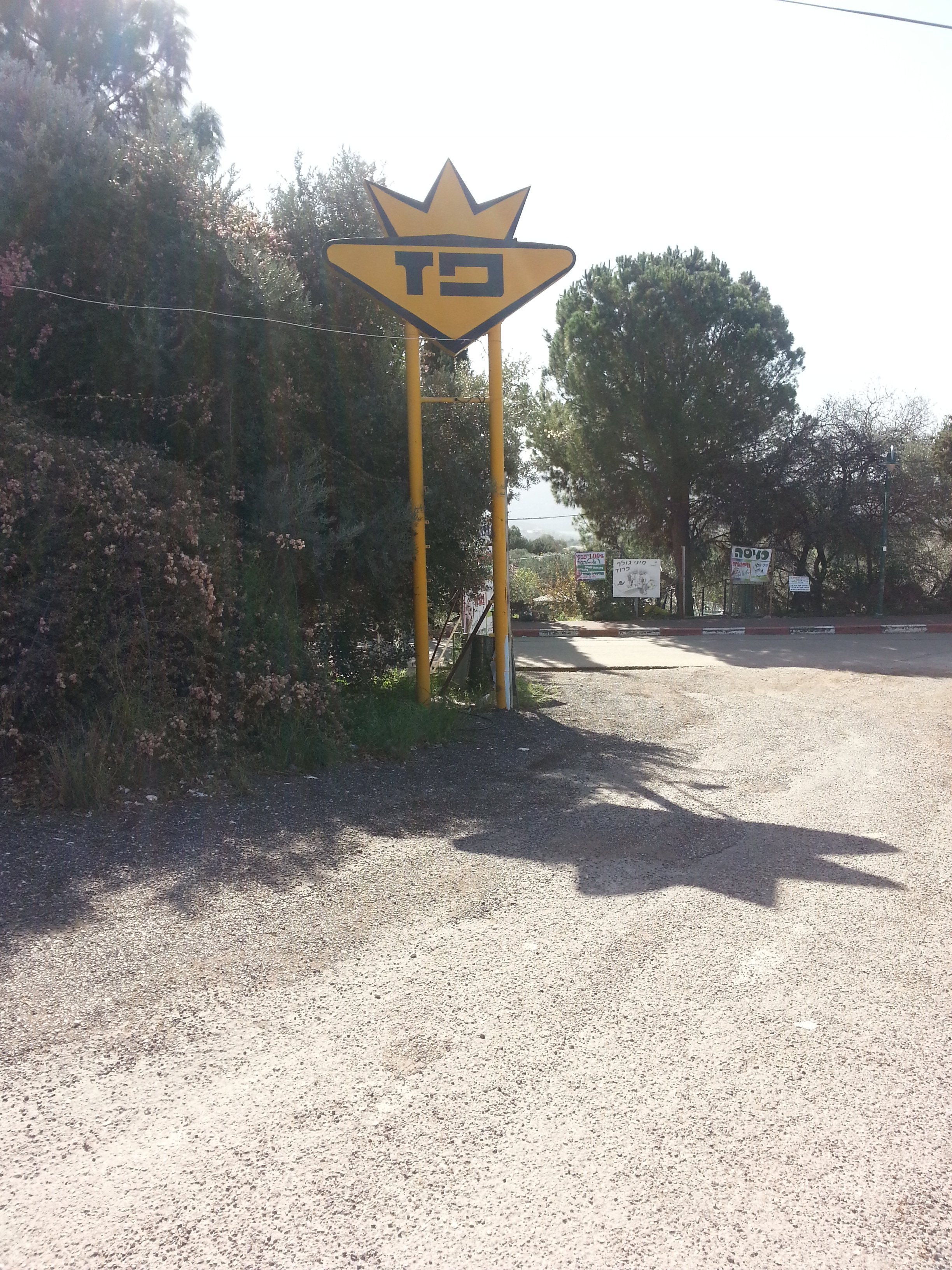 סמל ישן של פז, צולם בקיבוץ פרוד